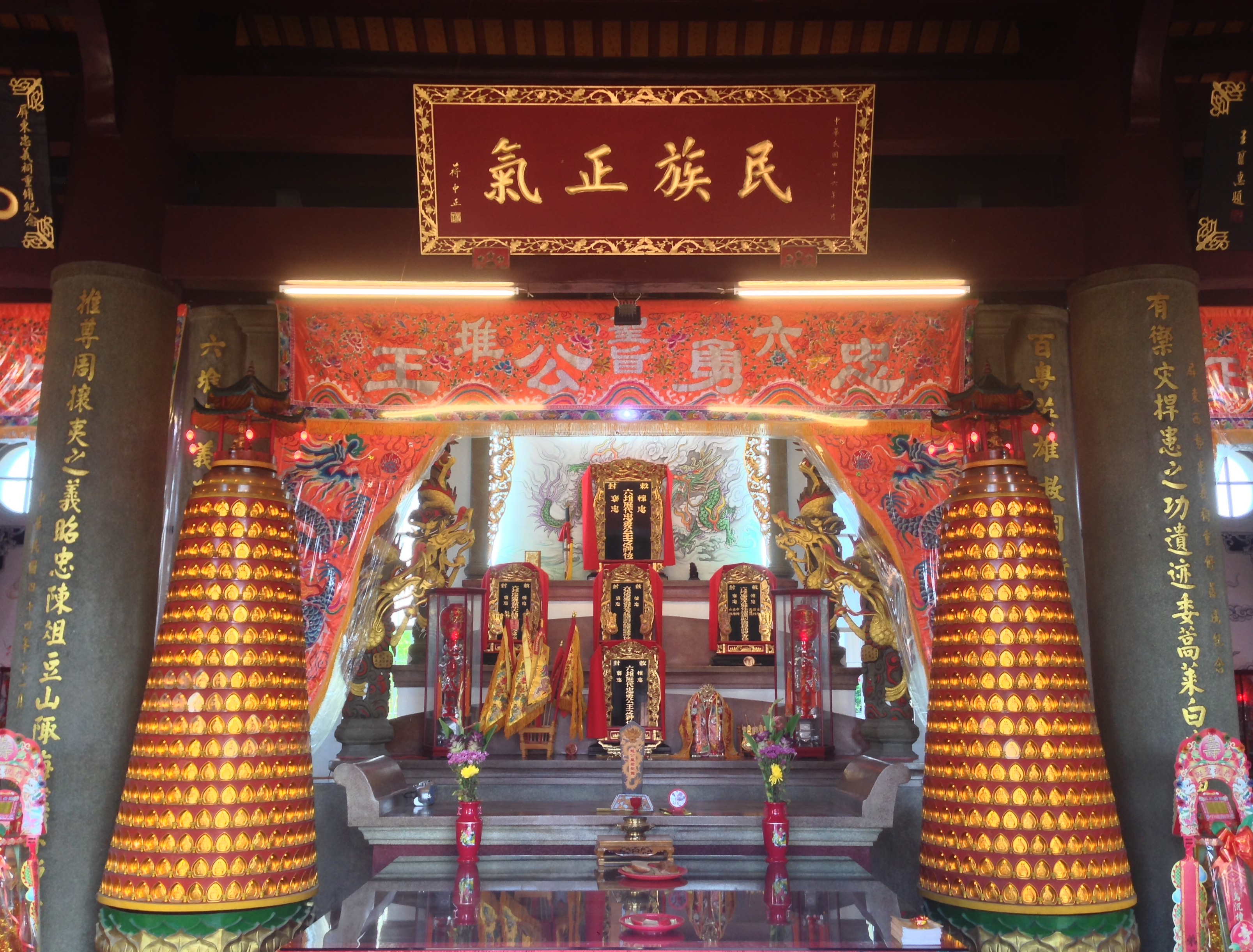 六堆忠義祠忠勇公牌位